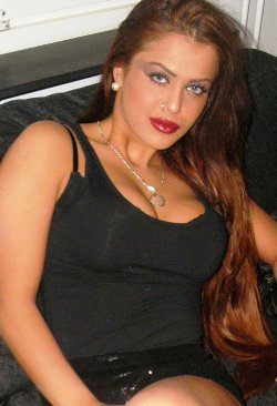 کوردی: Nasli1